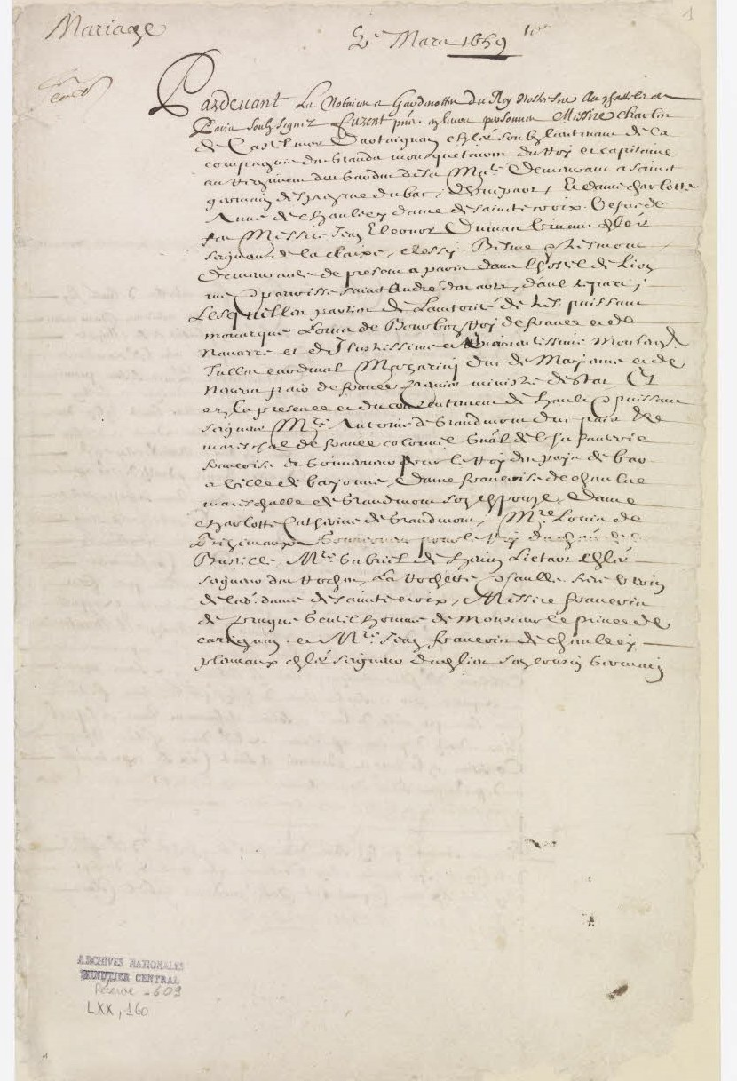 Contrat de mariage entre Charles de Castelmore d'Artagnan et Charlotte Anne de Chanlecy, 5 mars 1659 Page 1